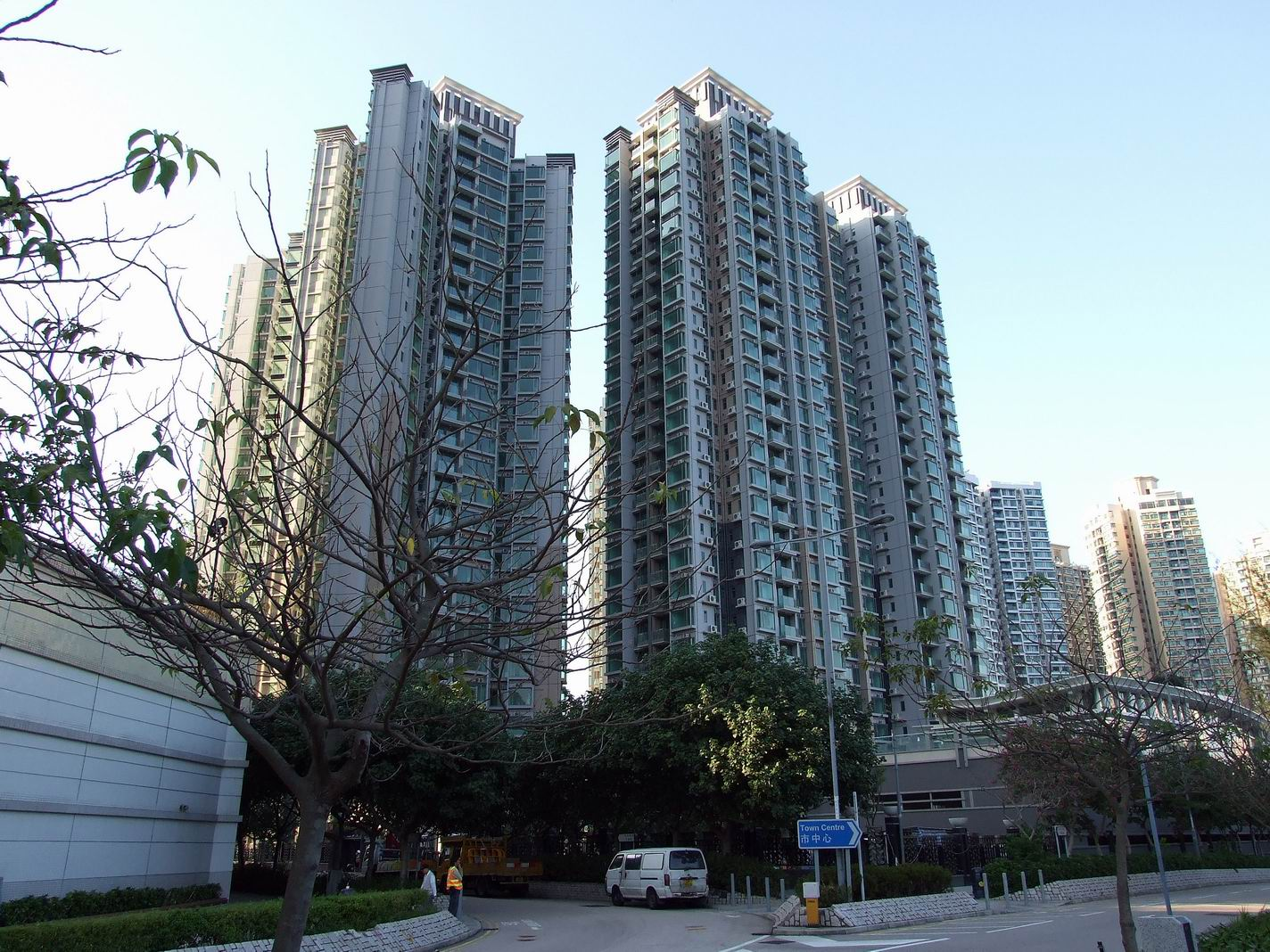 嵐岸